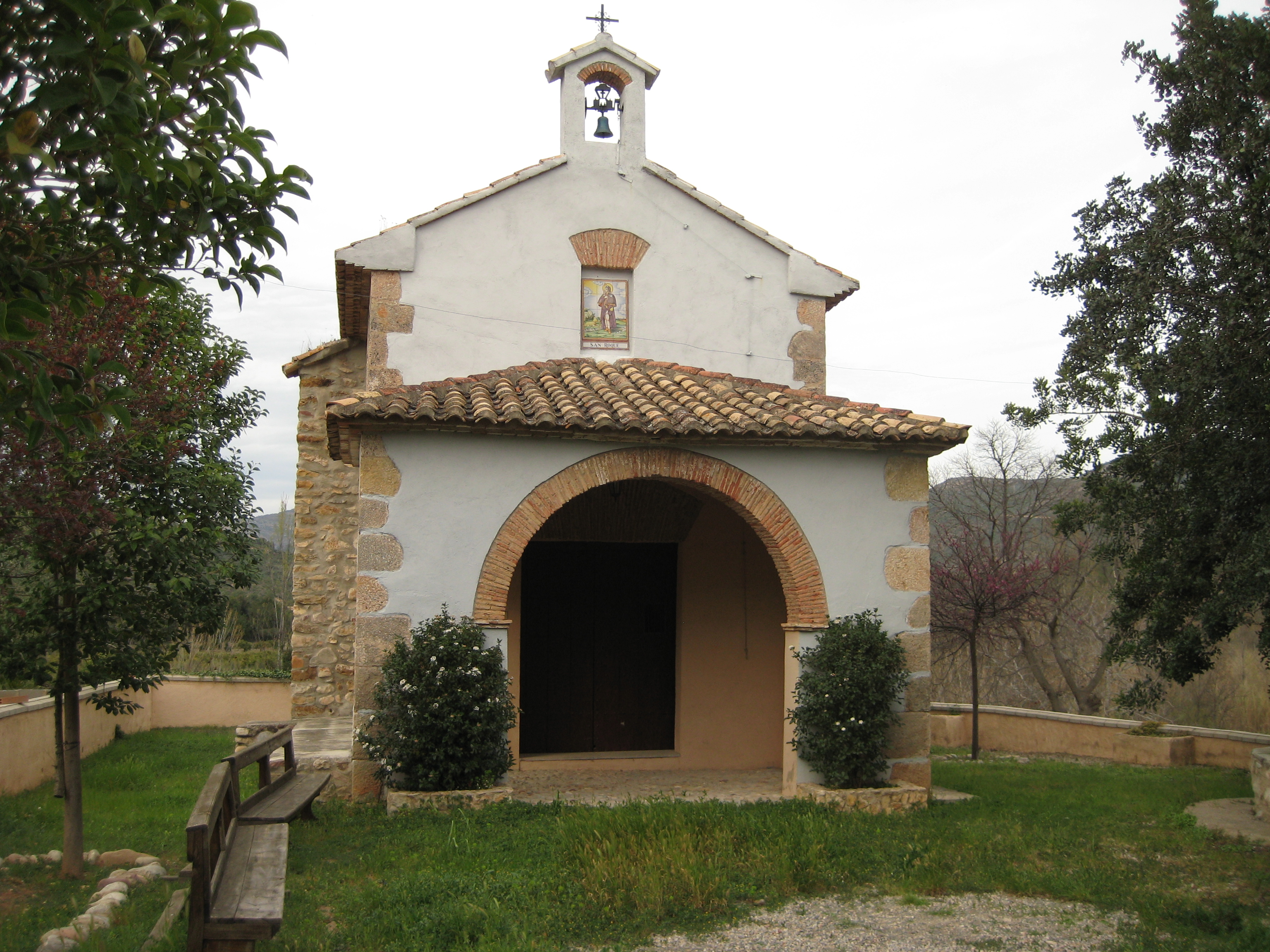 Ermita de Sant roc d'Espadella (Alt Millars)